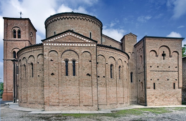 Pieve di Quarantoli - lato posteriore